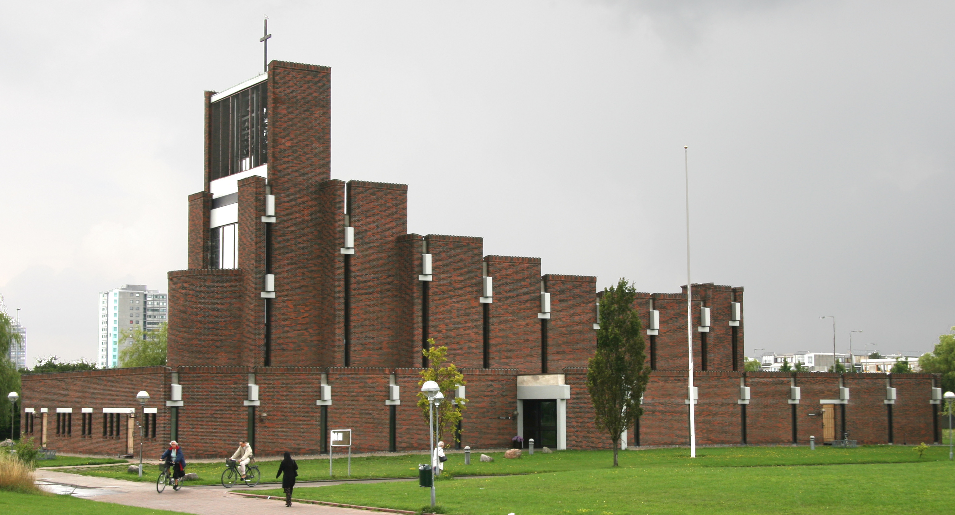 Brøndby Strand Kirke, Copenhagen County, Denmark.